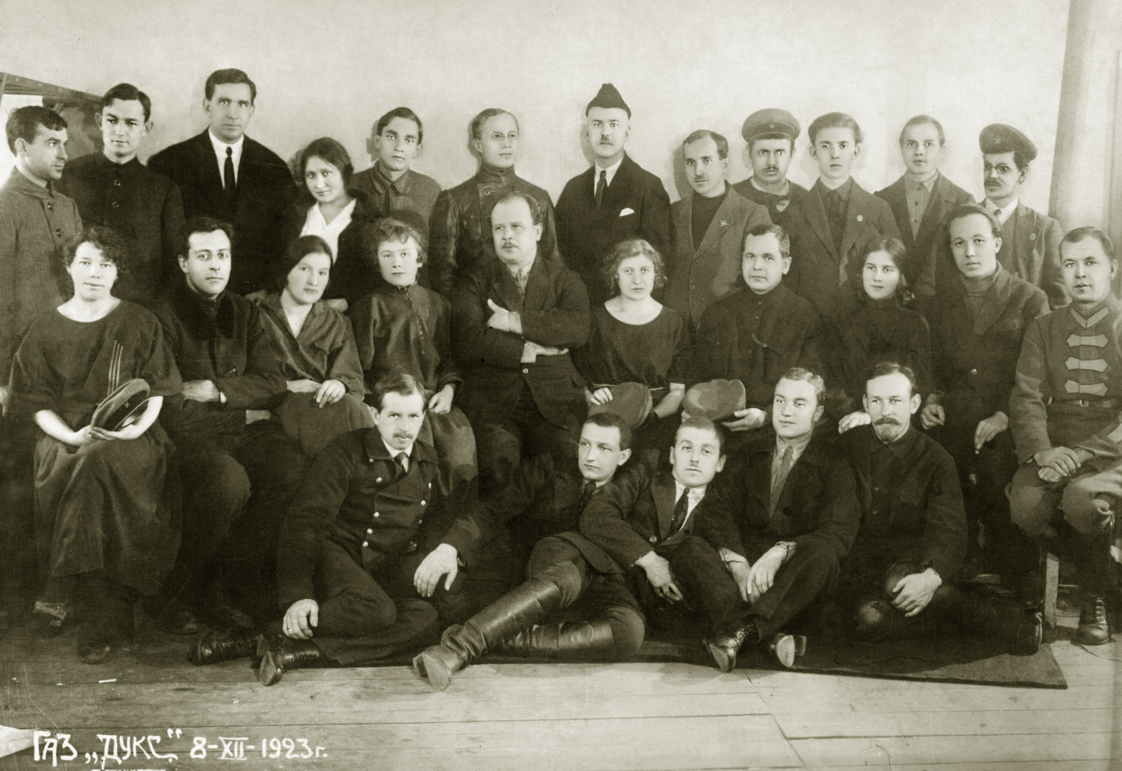 Сотрудники конструкторского отдела Авиазавод ГАЗ № 1 "Дукс" во главе со своим руководителем Д. П. Григоровичем.